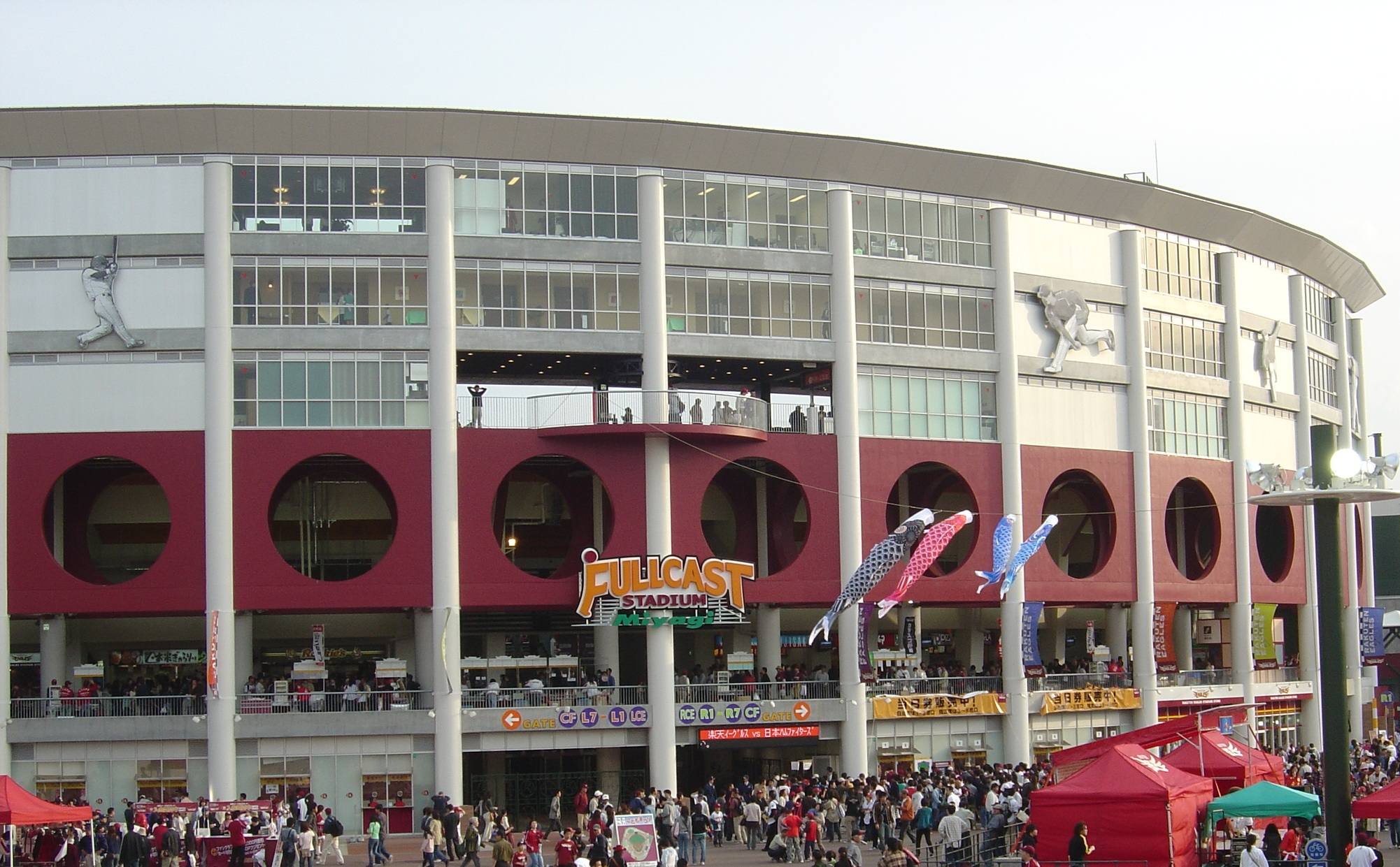 Fullcast Stadium, in Sendai, Japan